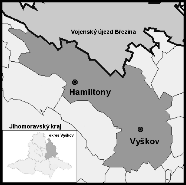 Výřez Hamiltony (Vyškov- czech republic)